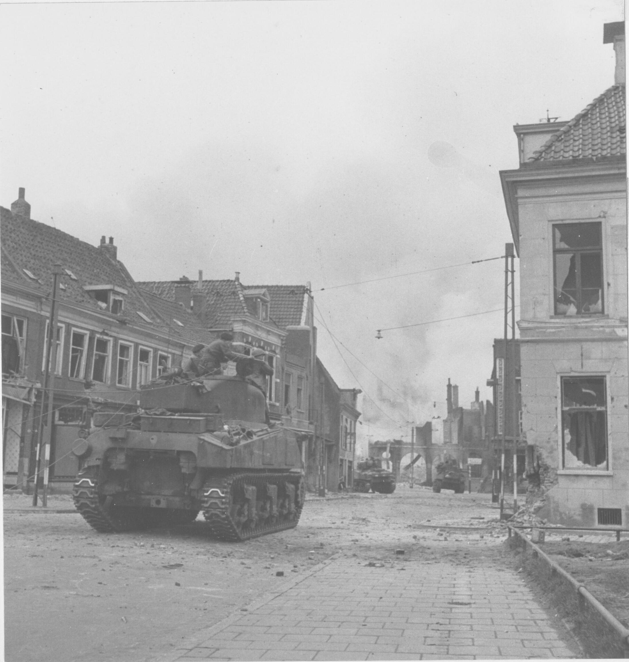 Canadese tanks vuren op gebouwen vanaf de Rademarkt tijdens de Bevrijding van Groningen